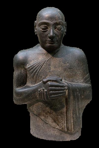 Da qui